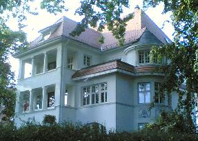 Villa Buerk, Villingen-Schwenningen, Deutschland